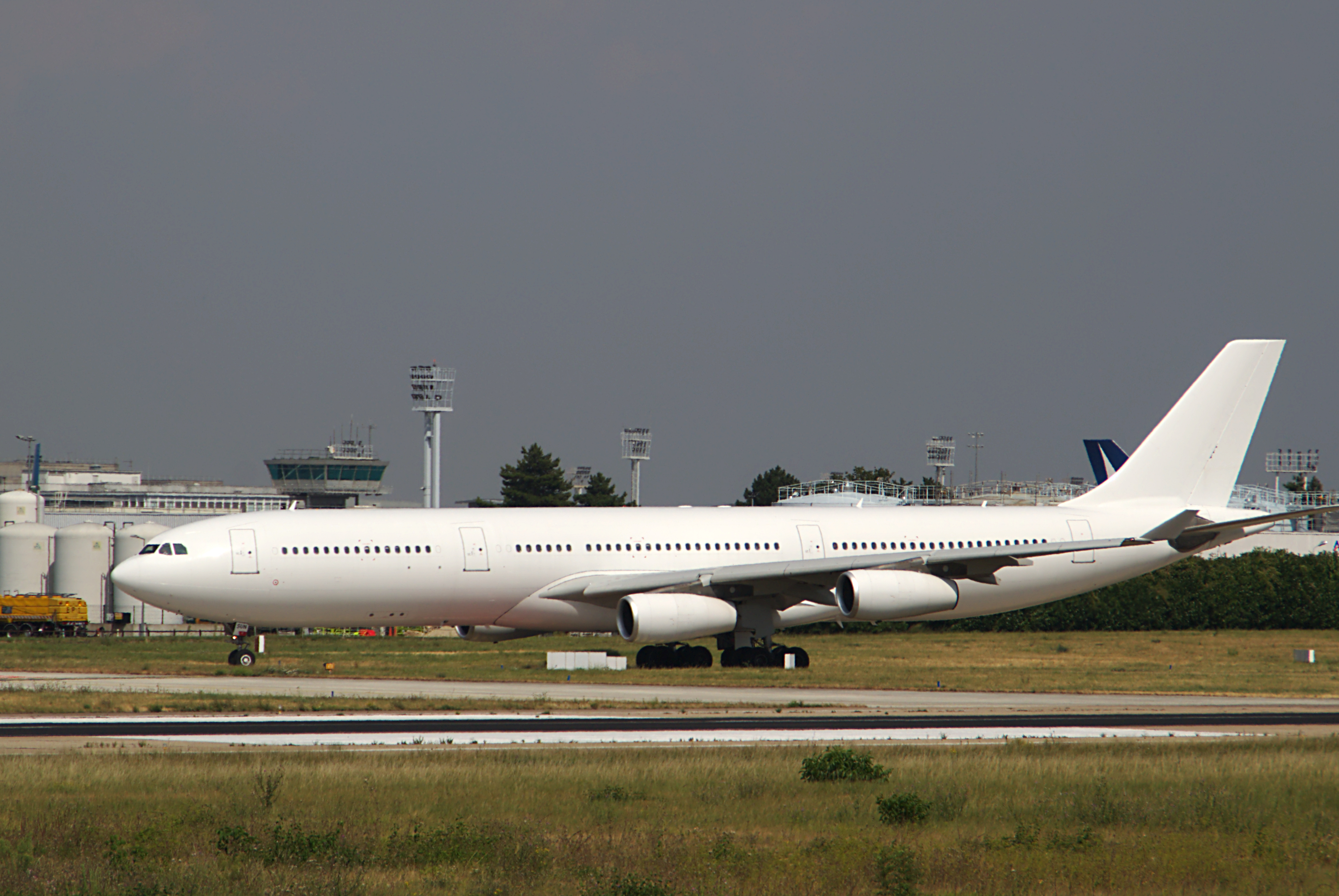 Avion à l'aéroport d'Orly - Paris